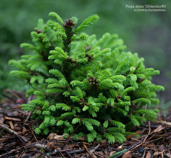 молодое растение весной